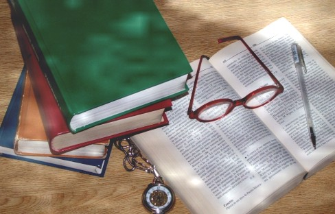 Libri books2